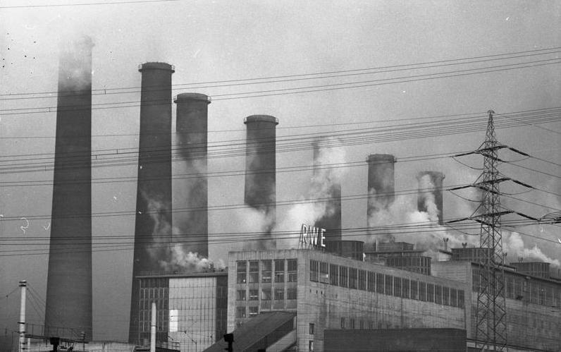 Braunkohle Kraftwerke bei Grevenbroich Neurath, 15-36 Frimmersdorf